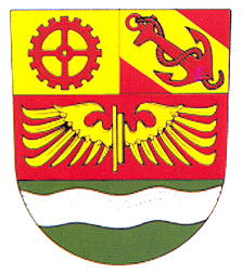 Podmokly today part of Děčín - coat of arms Česky: Znak města Podmokly, dnes součástí města Děčína